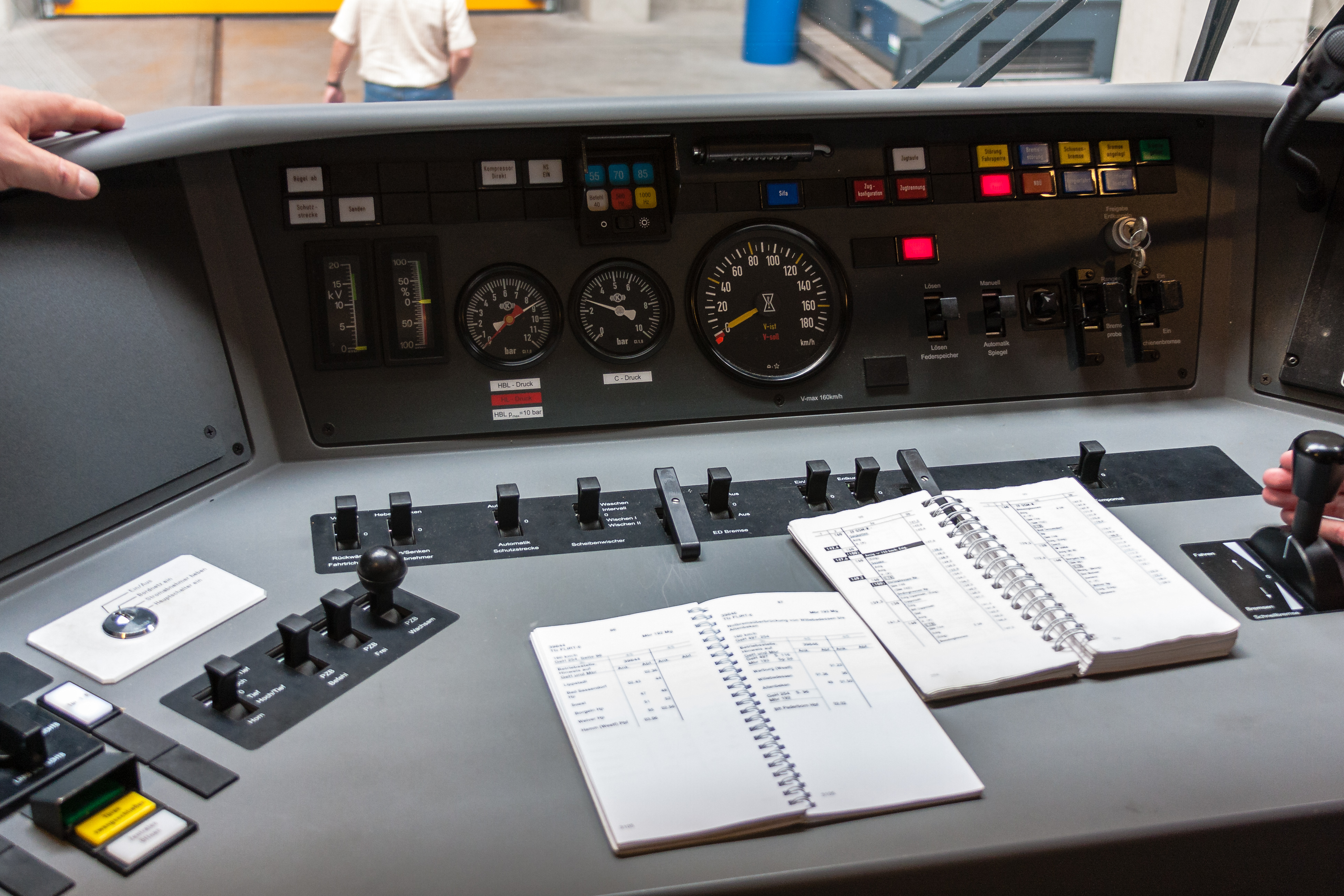 Führerstand eines Zuges der Eurobahn